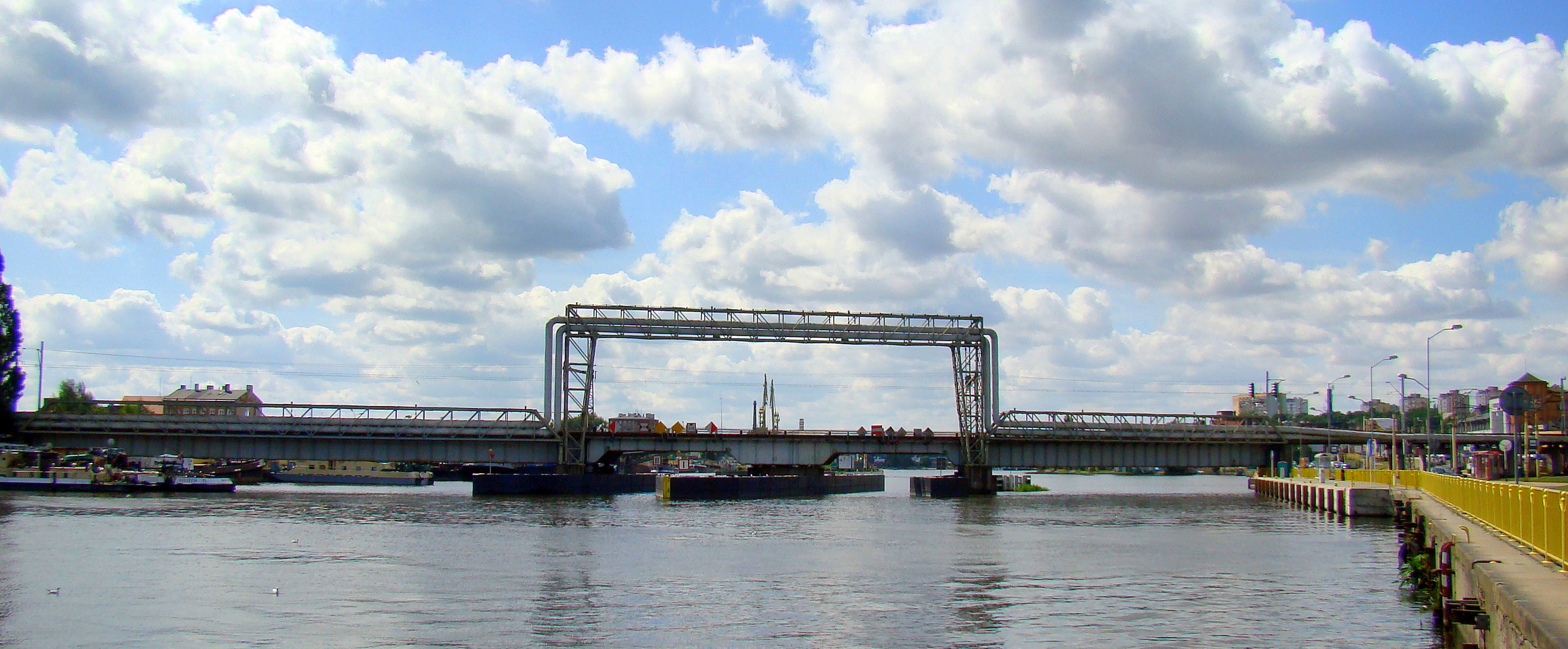 Most Kolejowy, Szczecin, Polska